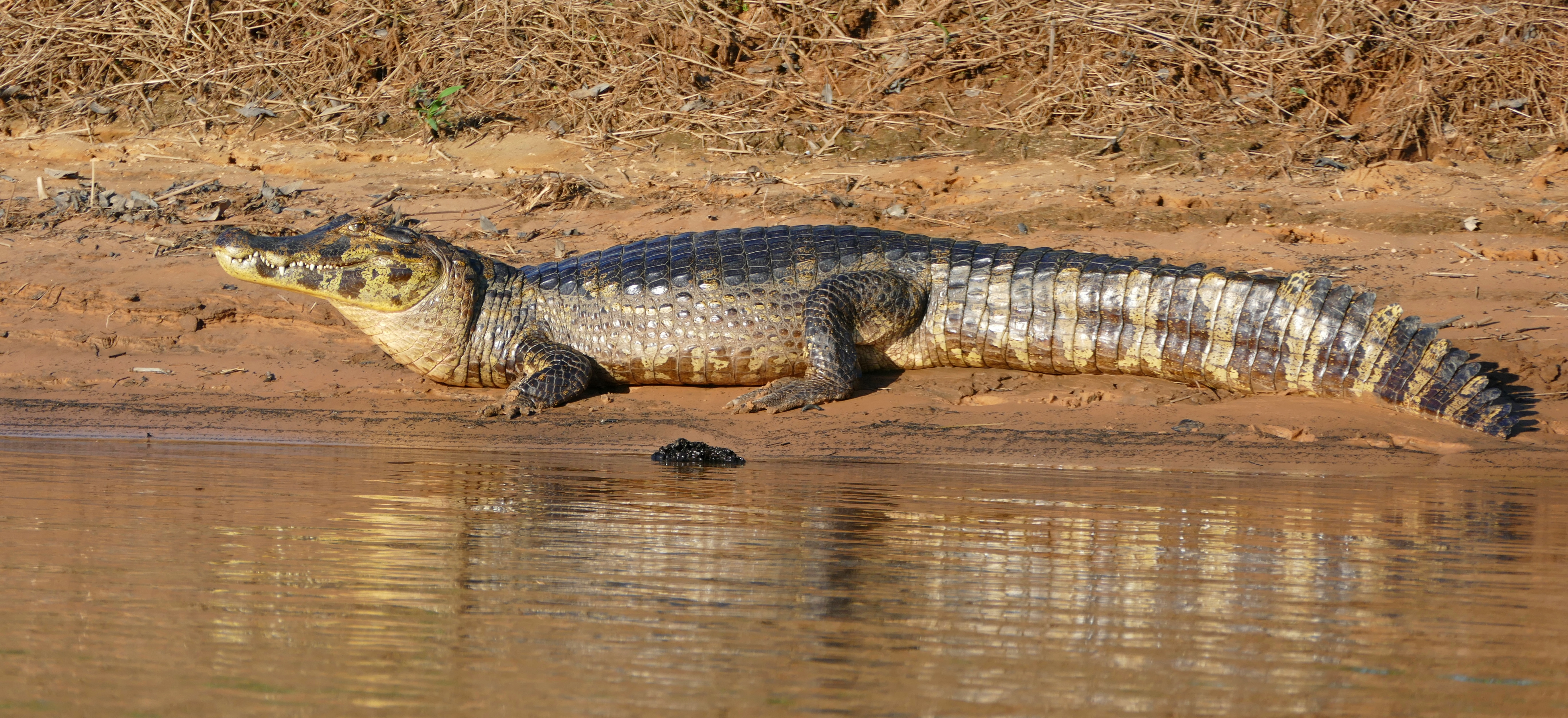 Cuiabá River, Porto Jofre, Poconé, Mato Grosso, BRAZIL